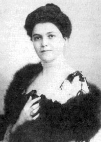 Varsányi Irén színésznő, mint Osztrigás Mici. Budapest, Vígszínház